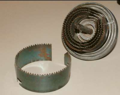 Gatenzaag